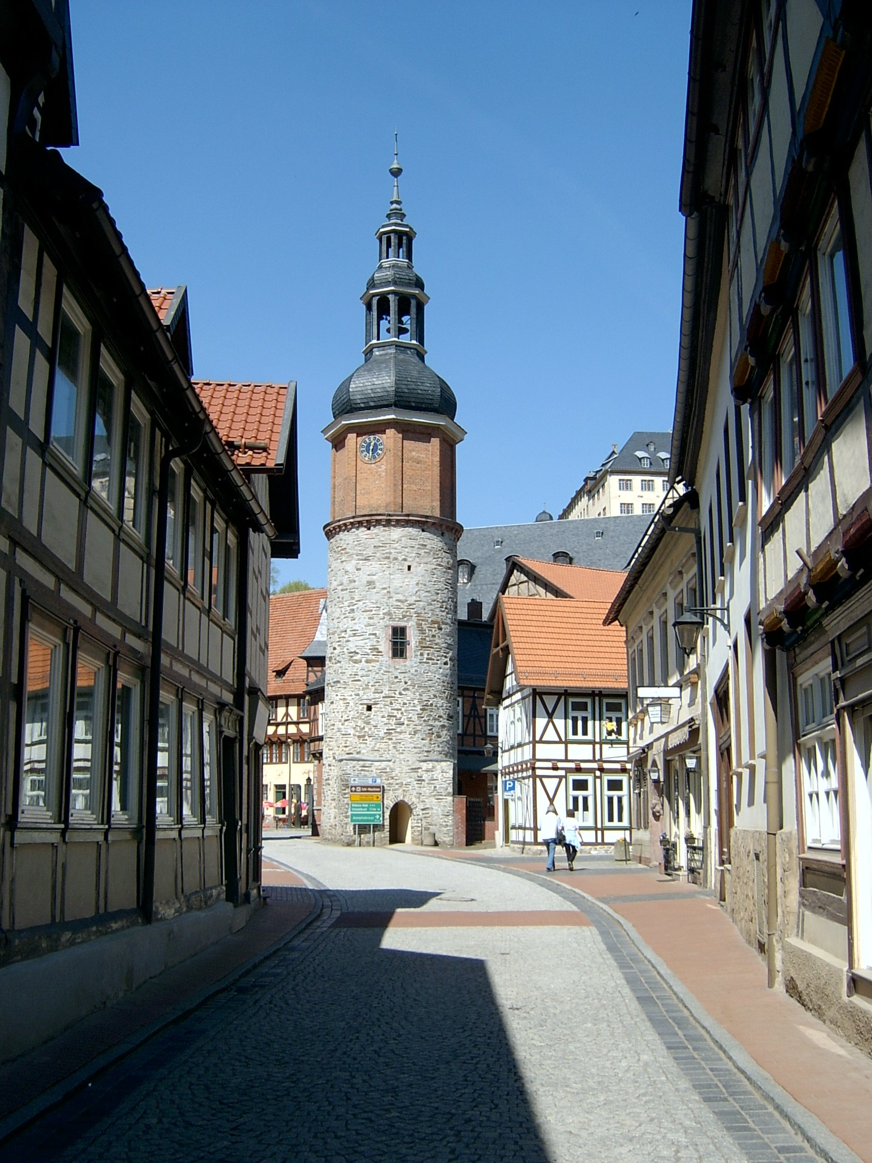 Stolberg (Harz)